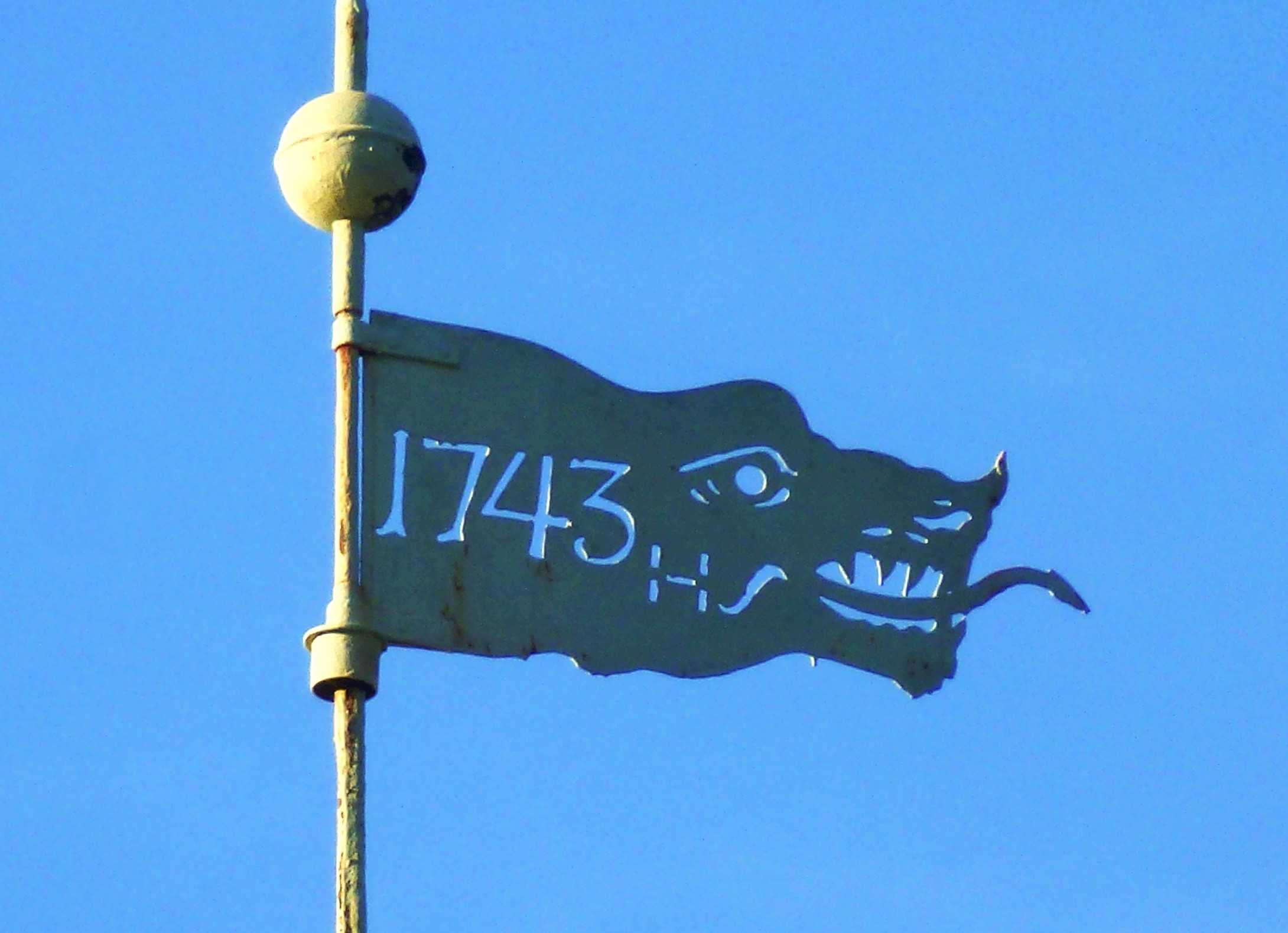 Apotekshuset, Djugårdsbrunn med vindflöjeln "1743"